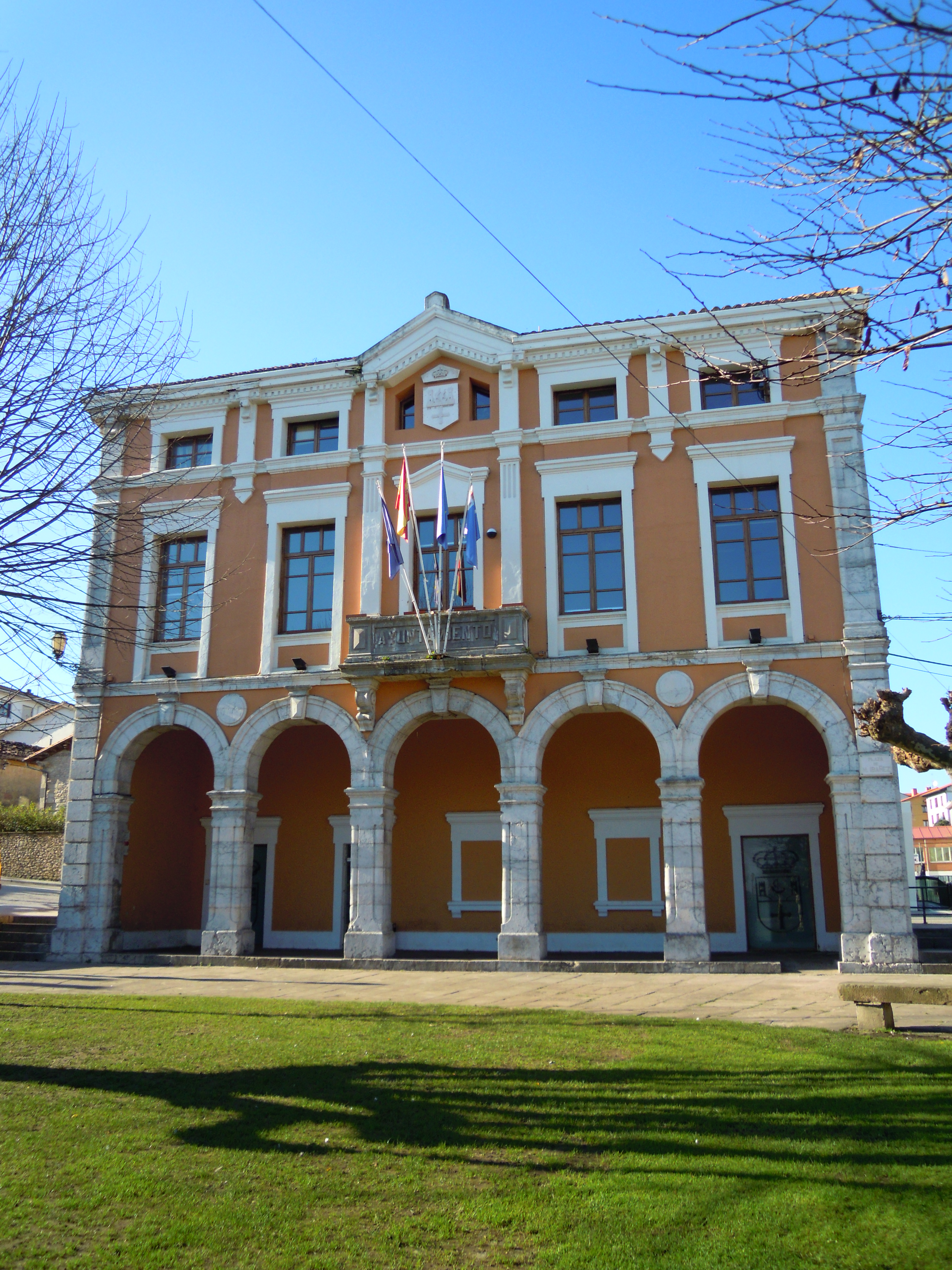 ayuntamientu